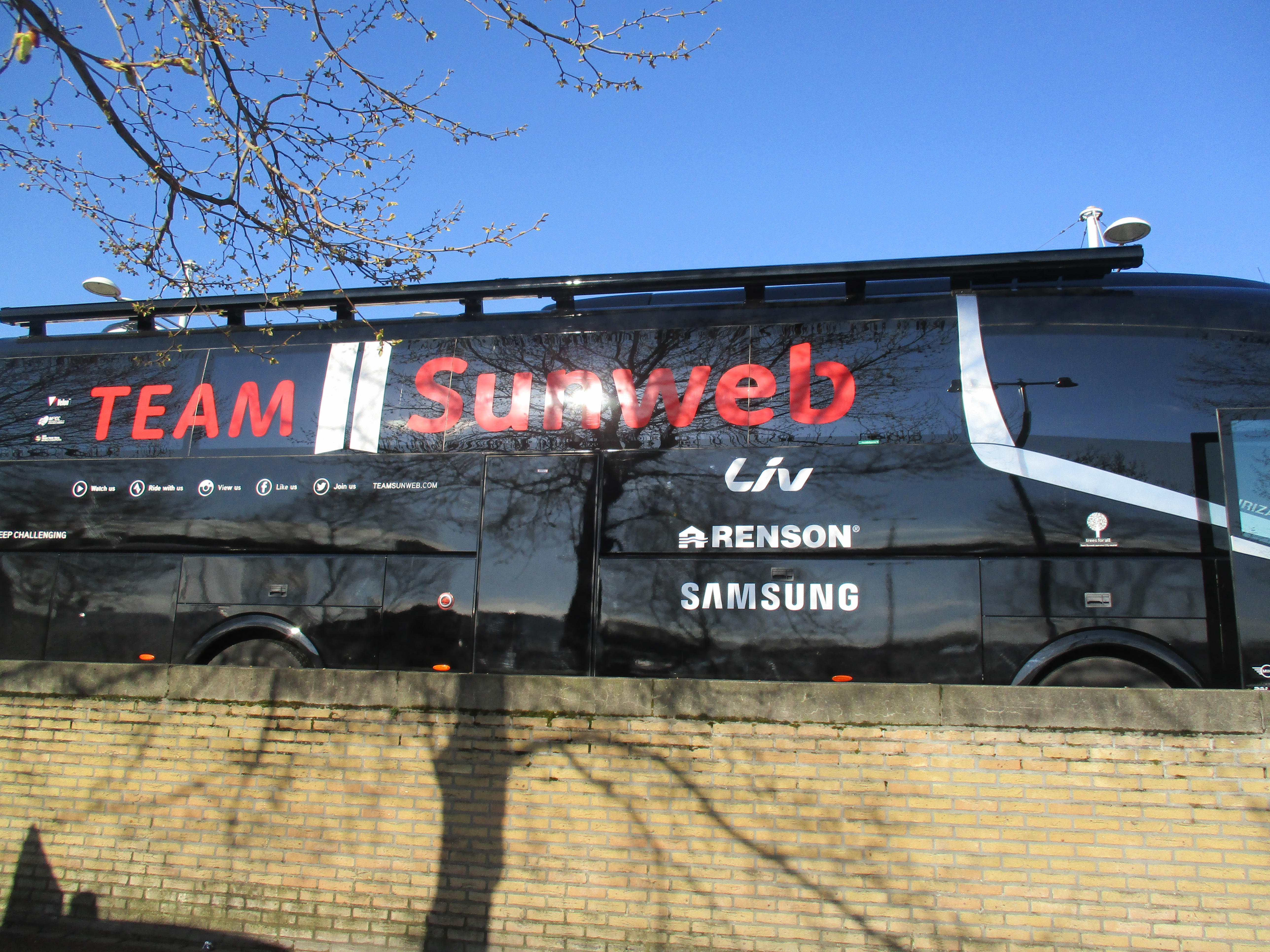 Start van de Amstel Gold Race Ladies Edition 2018 in Maastricht.